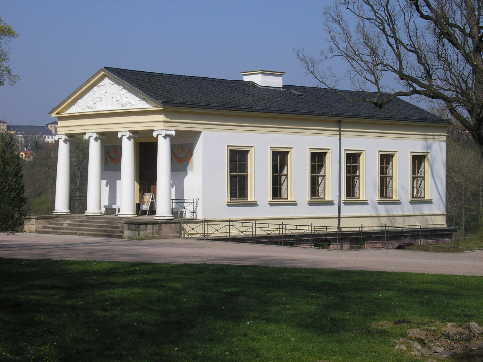 Das Römische Haus in Weimar (Thüringen).